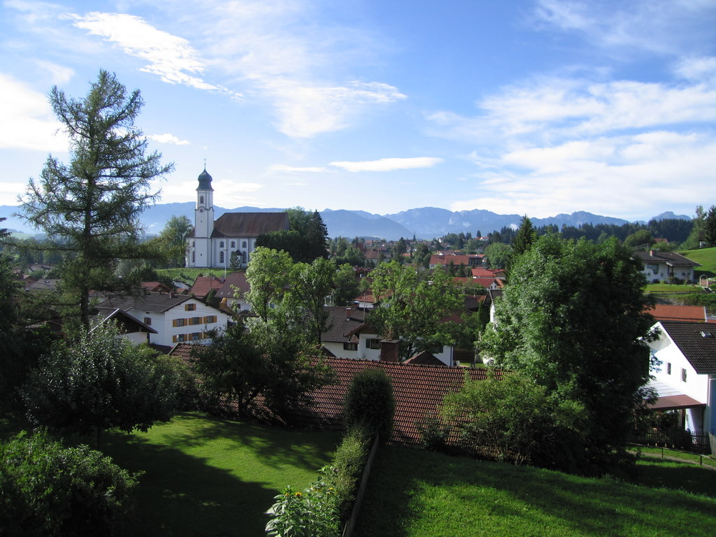 Lechbruck, Steig, Golfplatz, Germany, Bavaria